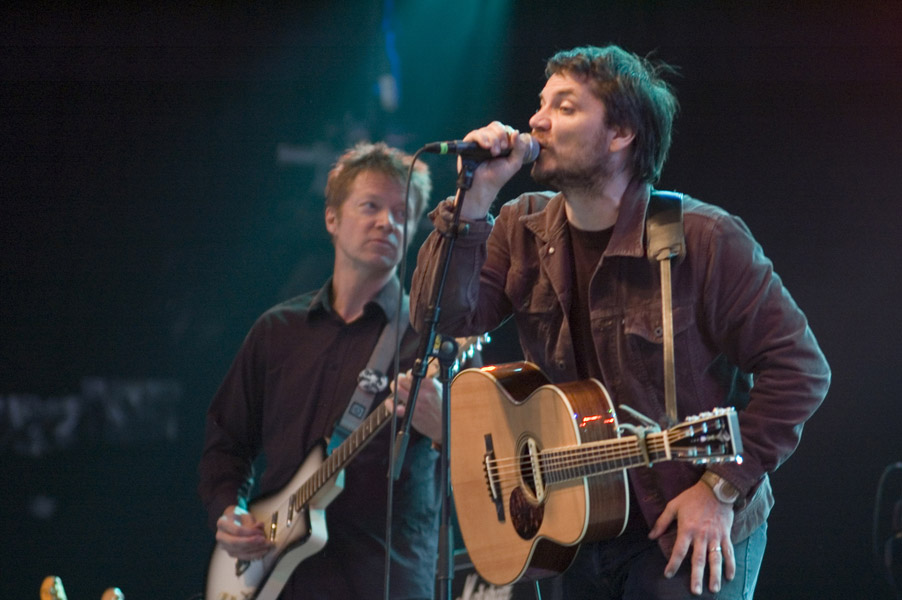 Wilco @ Roskilde Festival '07